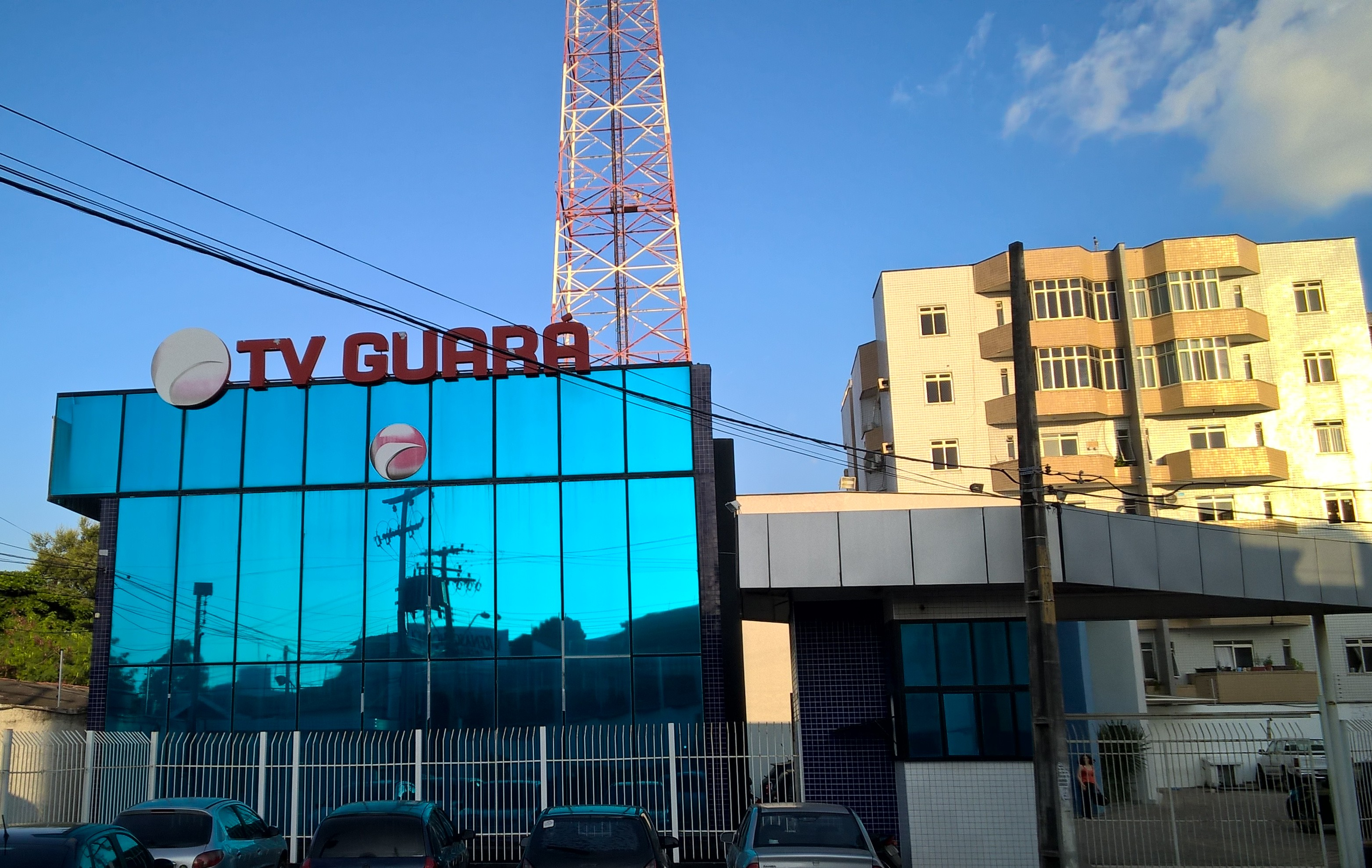 Sede da TV Guará, emissora de televisão sediada em São Luís, MA - Brasil